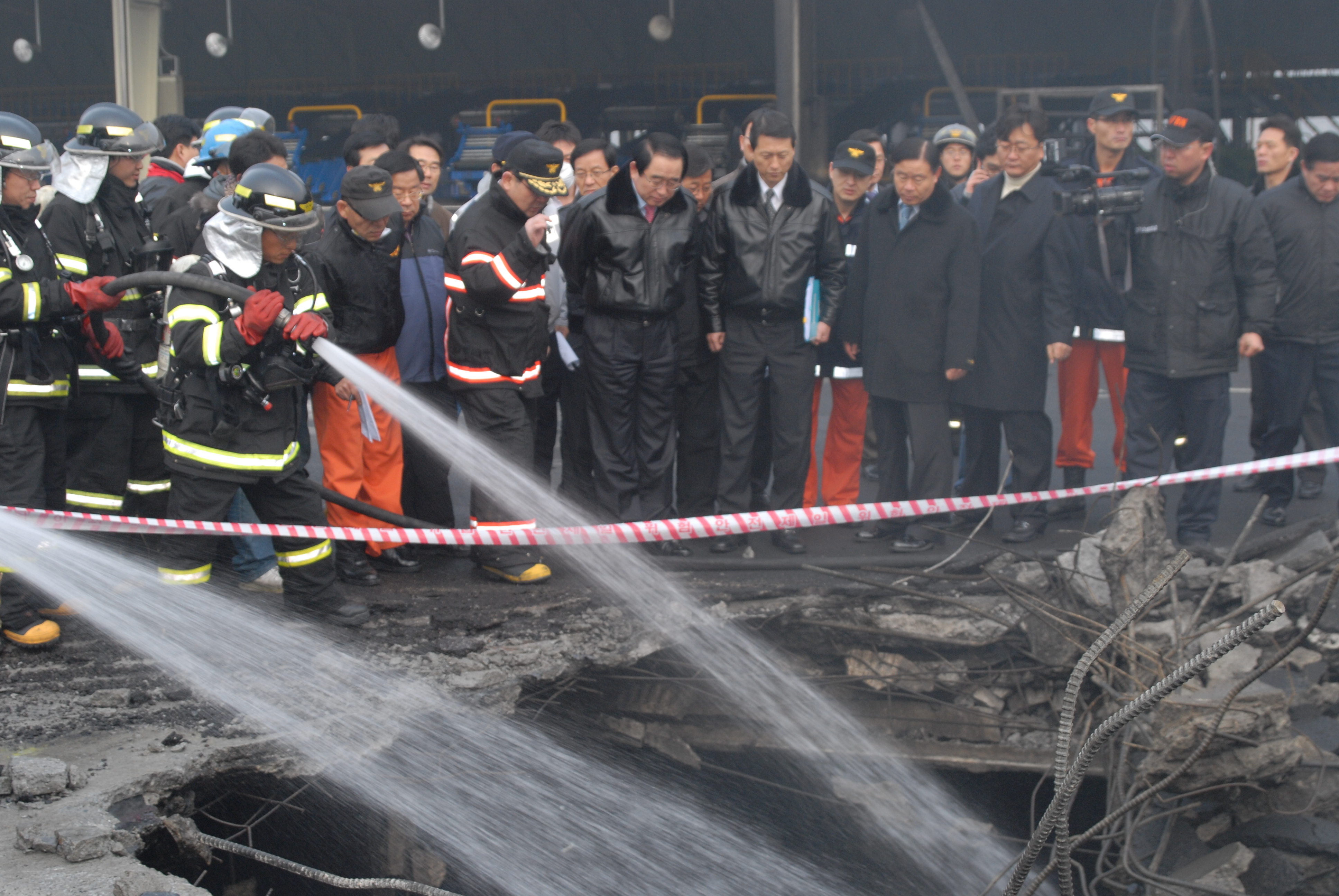 2008년 1월 경기도 이천시 (주)코리아 2000 냉동 물류 창고 화재